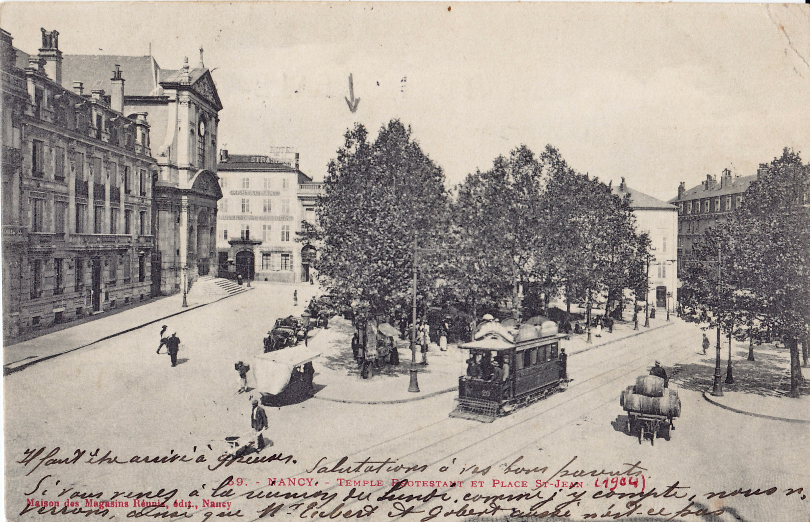 Carte postale ancienne éditée par la Maison des Magasins Réunis à Nancy, n°69 : NANCY - Temple protestant et Place St-Jean